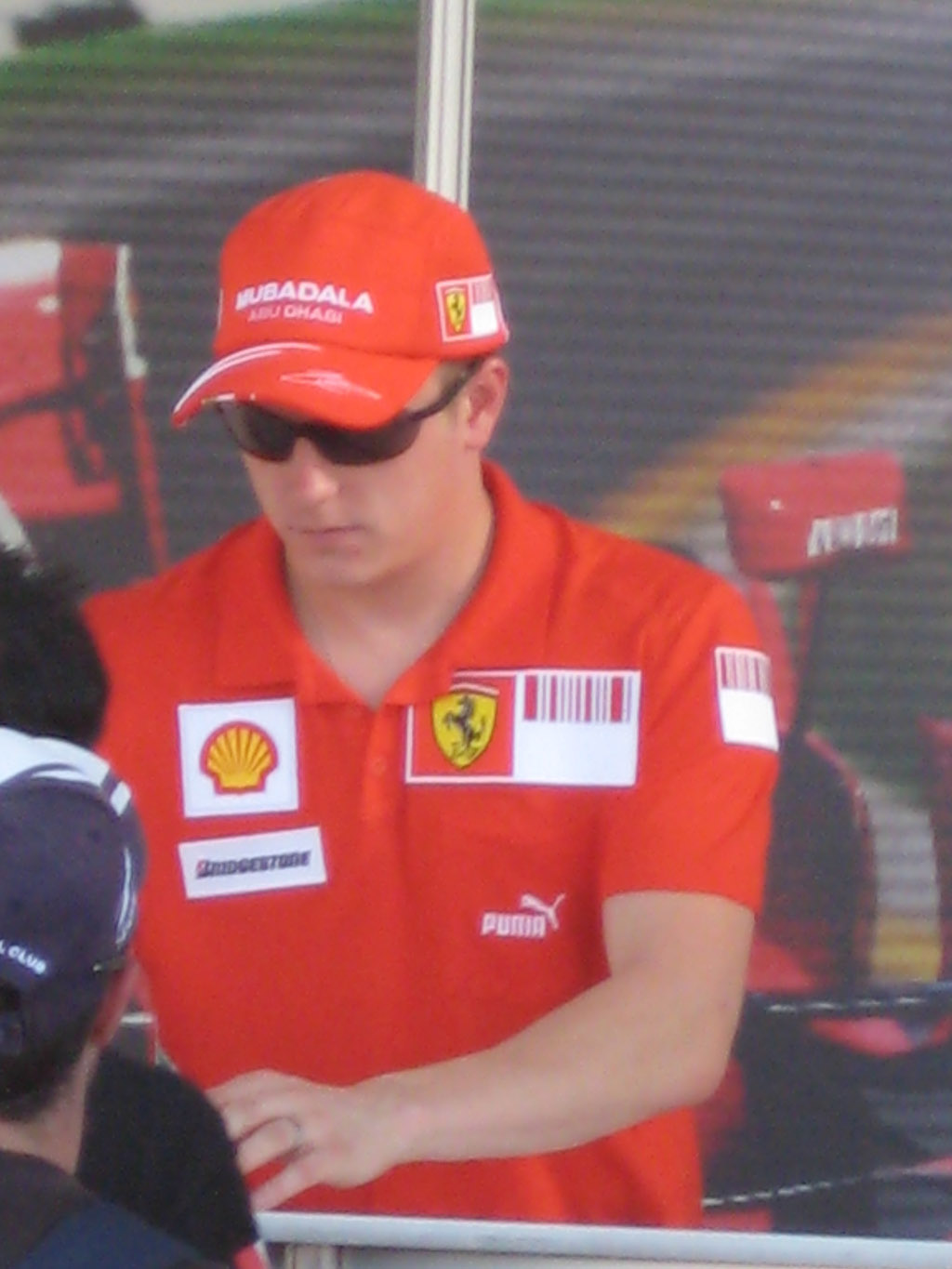 Kimi Räikkönen